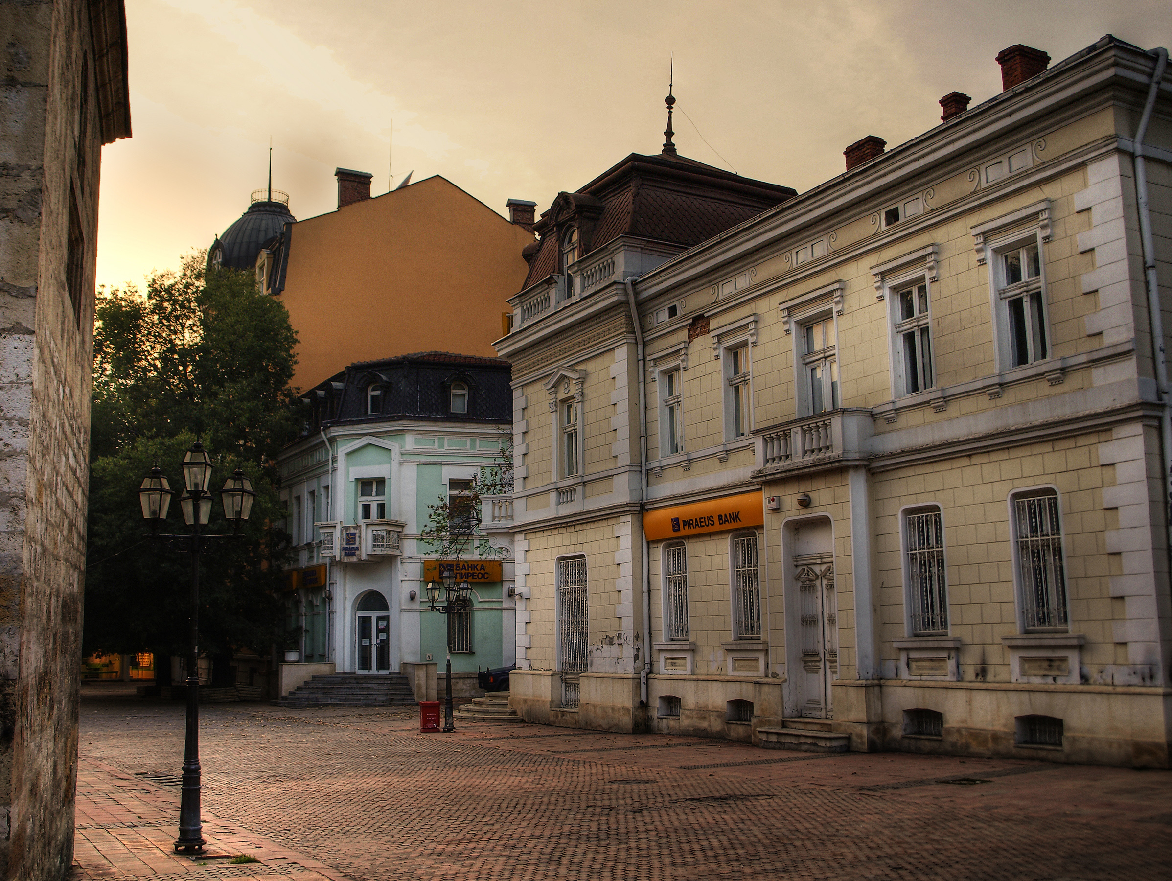 Central Pleven, Bulgaria